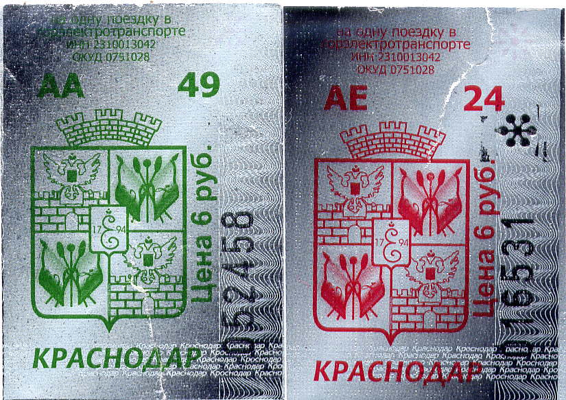 Билеты на электротранспорт Краснодара.